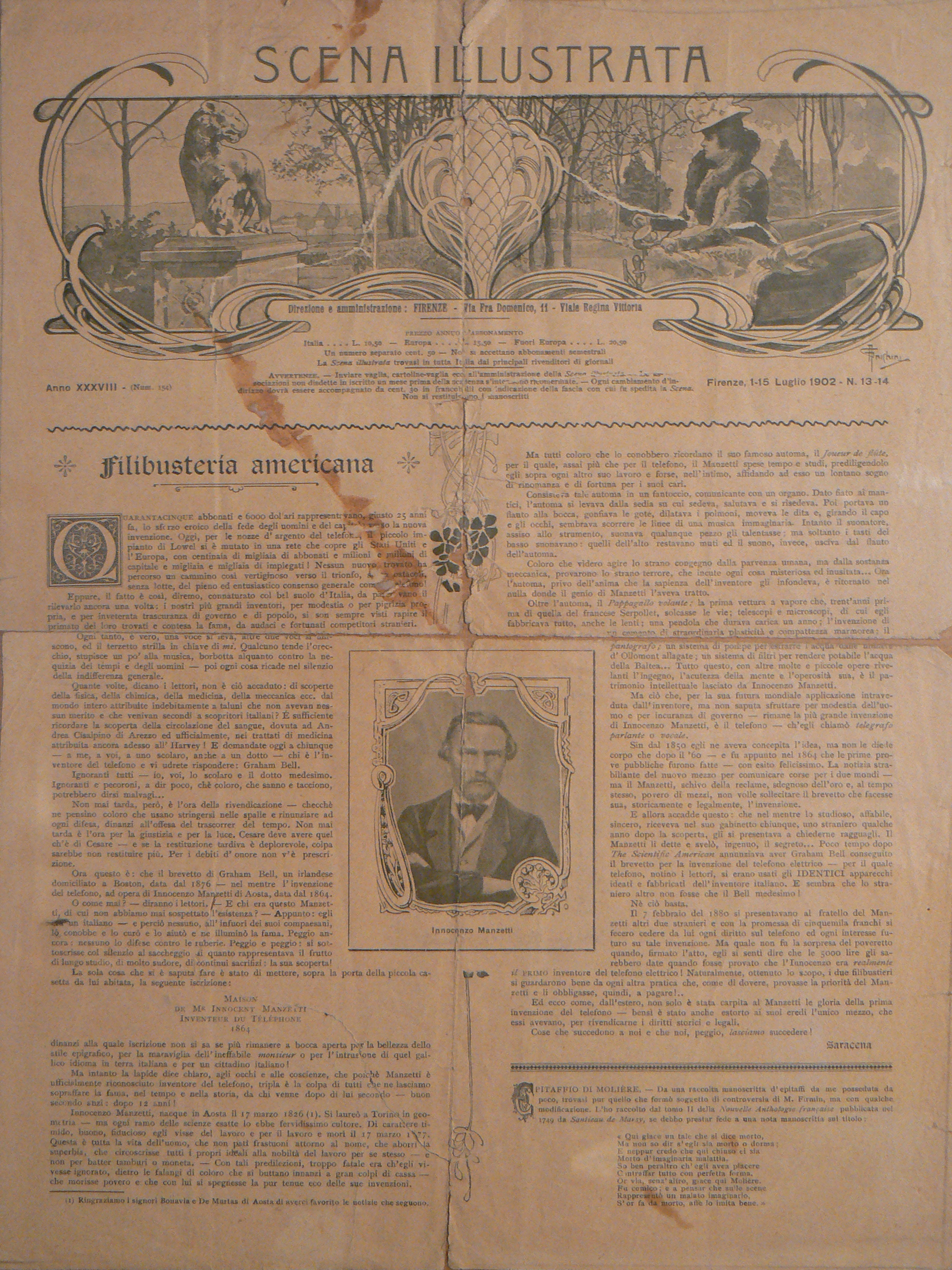 Pagina del periodico "Scena illustrata", Firenze 1-15 luglio 1902. L'articolo "Filibusteria americana" si occupa di Innocenzo Manzetti inventore del telefono e non solo. Esposto all'expo Au fil des ondes, Maison De Mosse in Runaz, Avise (AO)